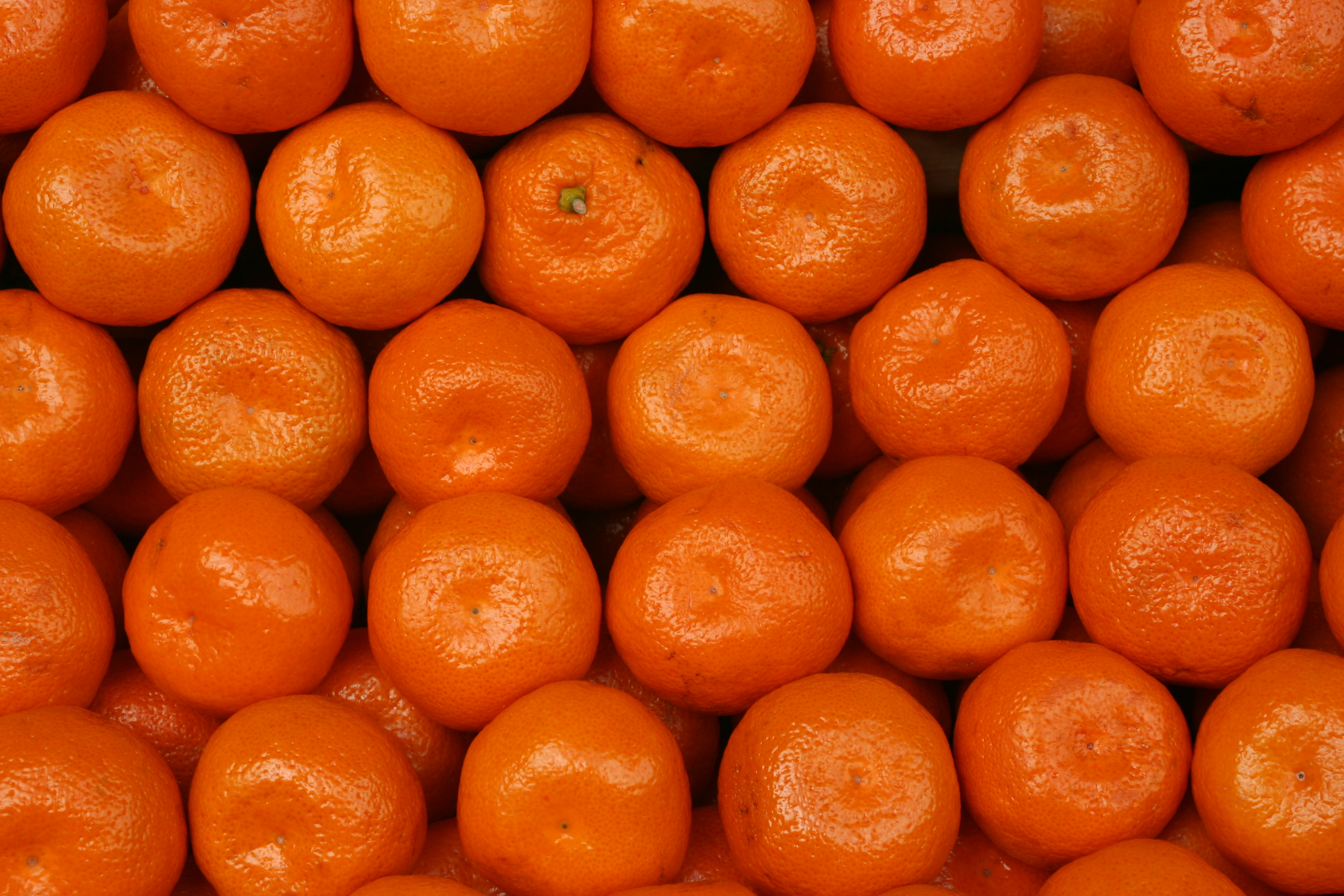 mandarinen beim obesthänderler vorm galataturm